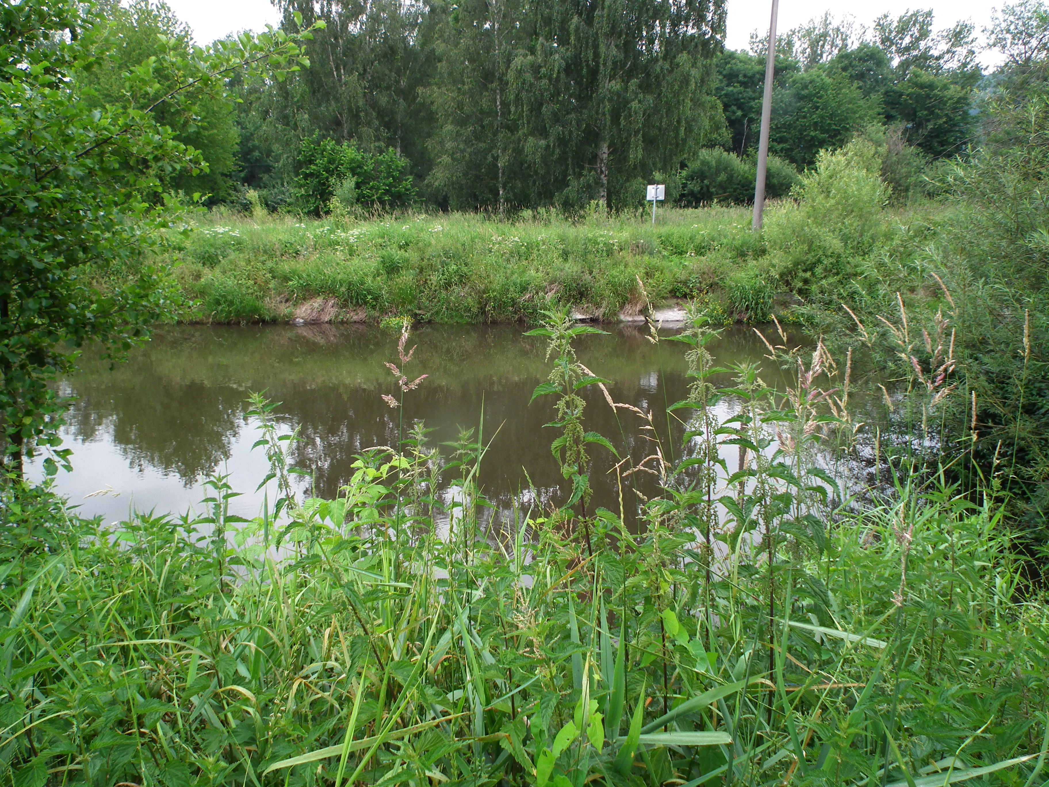 Rzeka Opawa w Bliszczycach.